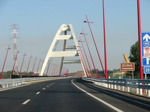 A dunaújvárosi híd